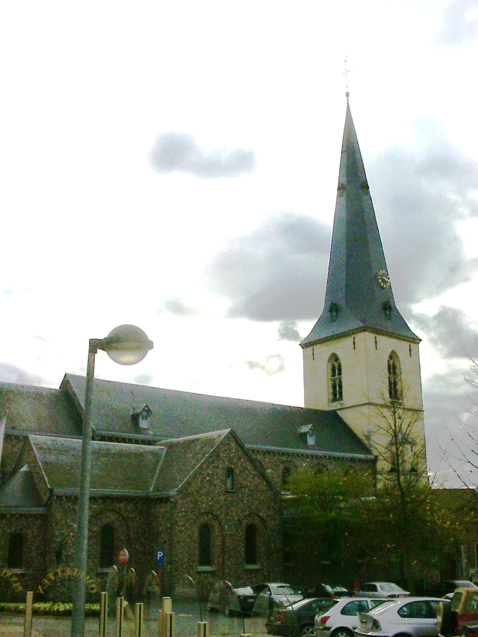 Sint-Odulfus, Borgloon, België